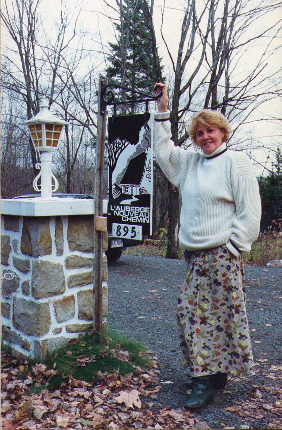 Photo prise lors de la construction de la Maison de réhabilitation pour femmes, à Val-David, Québec, l'Auberge du Nouveau-chemin